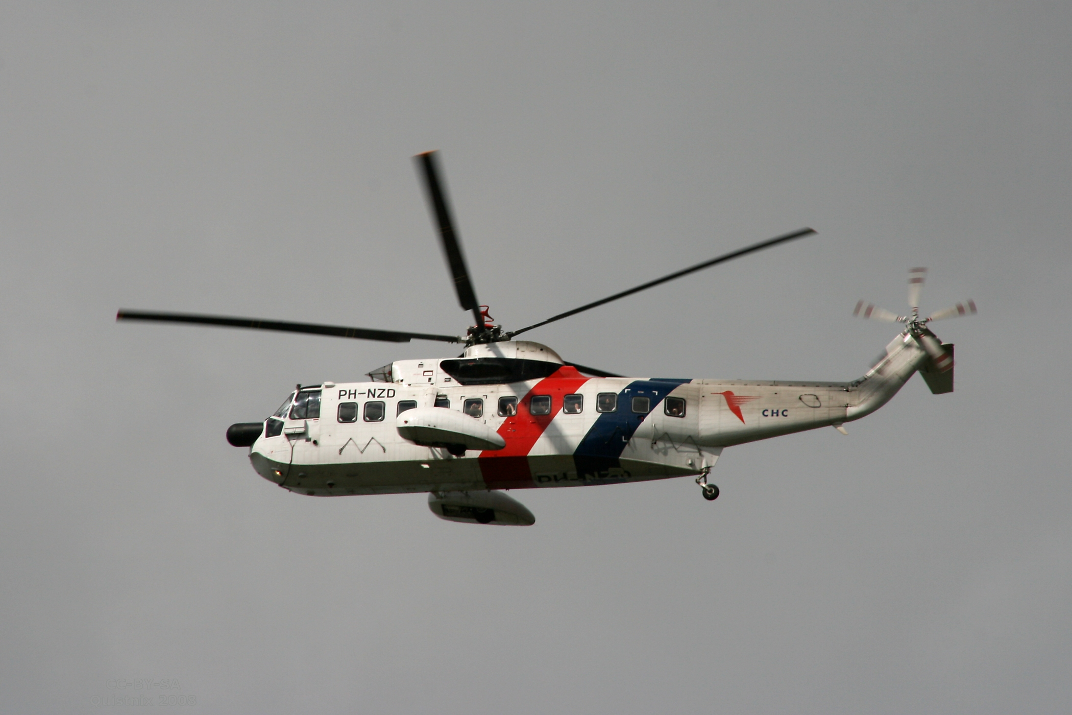 Sikorsky S-61N van CHC, vliegend boven Den Helder